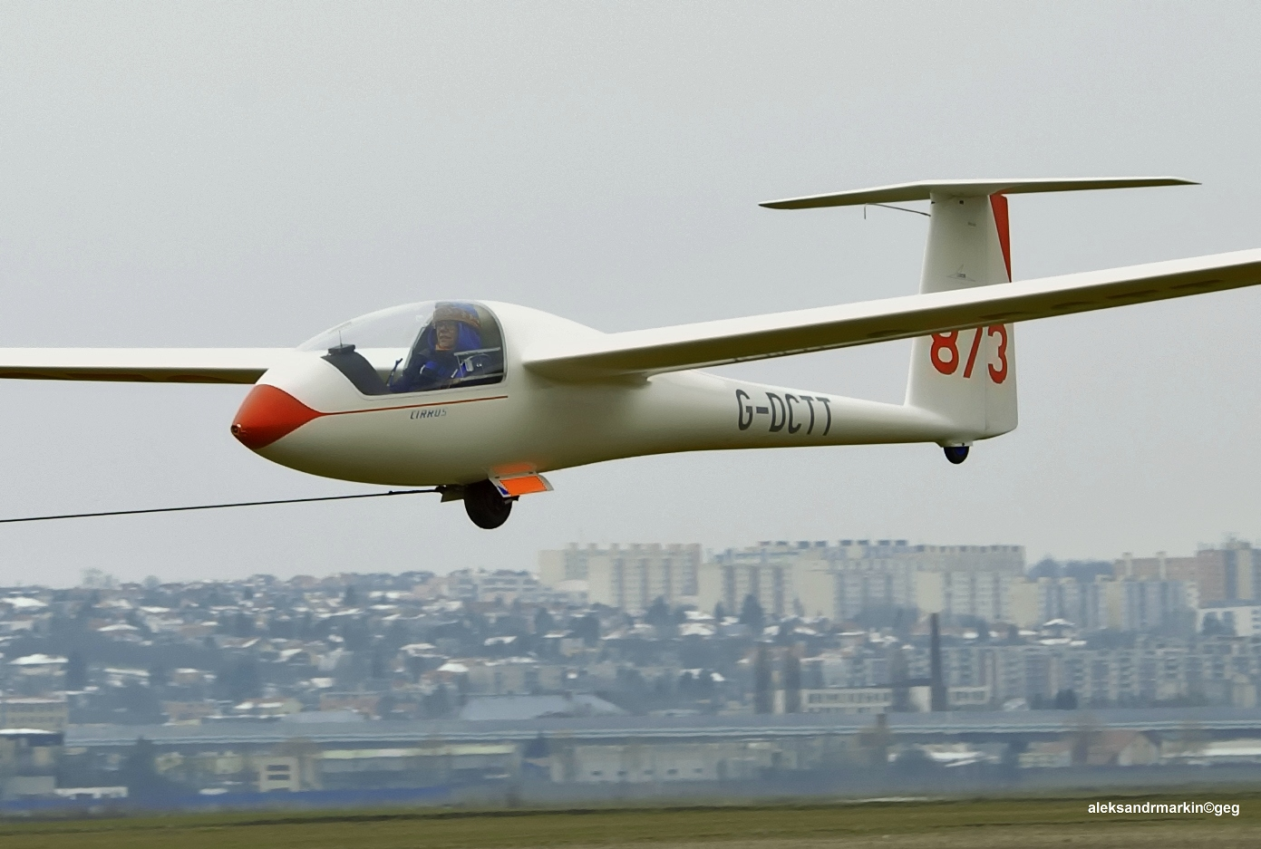 PribinaCup.Nitra 2013.Slovakia.